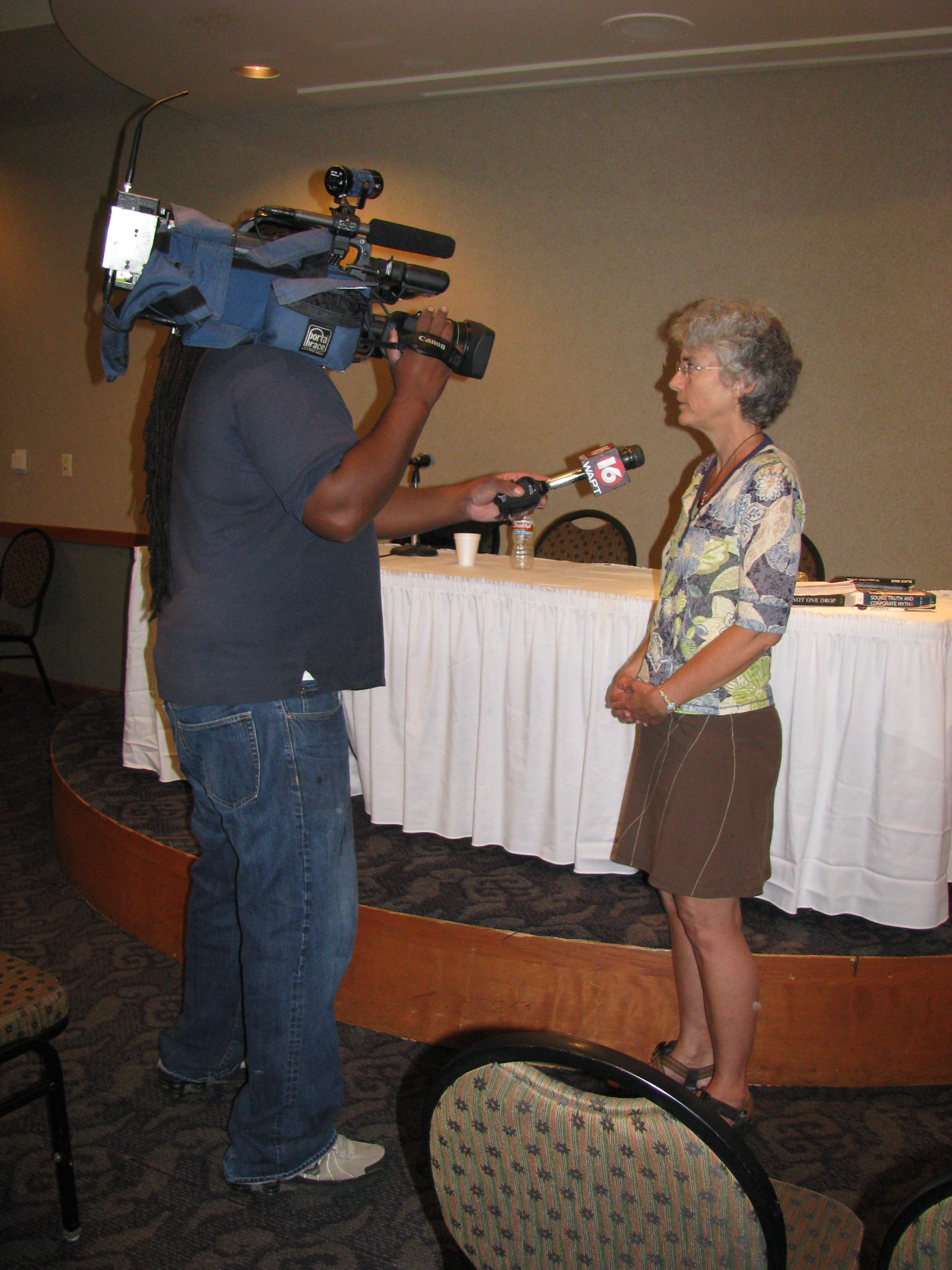 WAPT interviews Dr. Riki Ott.